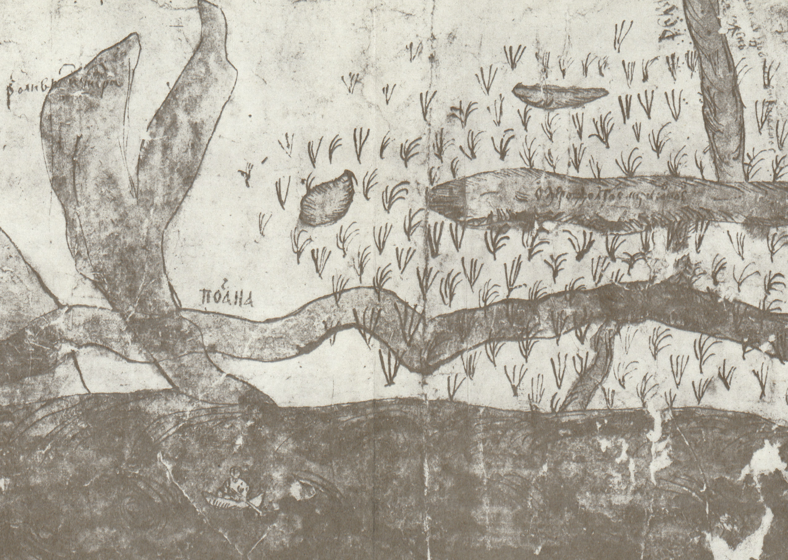 Фрагмент карты Киева подполковника Ушакова (1695), составленной по приказу российского Императора Петра I. Река Почайна (подписана "Почана"), протекающая параллельно реке Днепр, соединенна с озером (подписано "Долгое"), в которое впадает другая река - Сырец. На Днепре видна фигура человека в лодке.